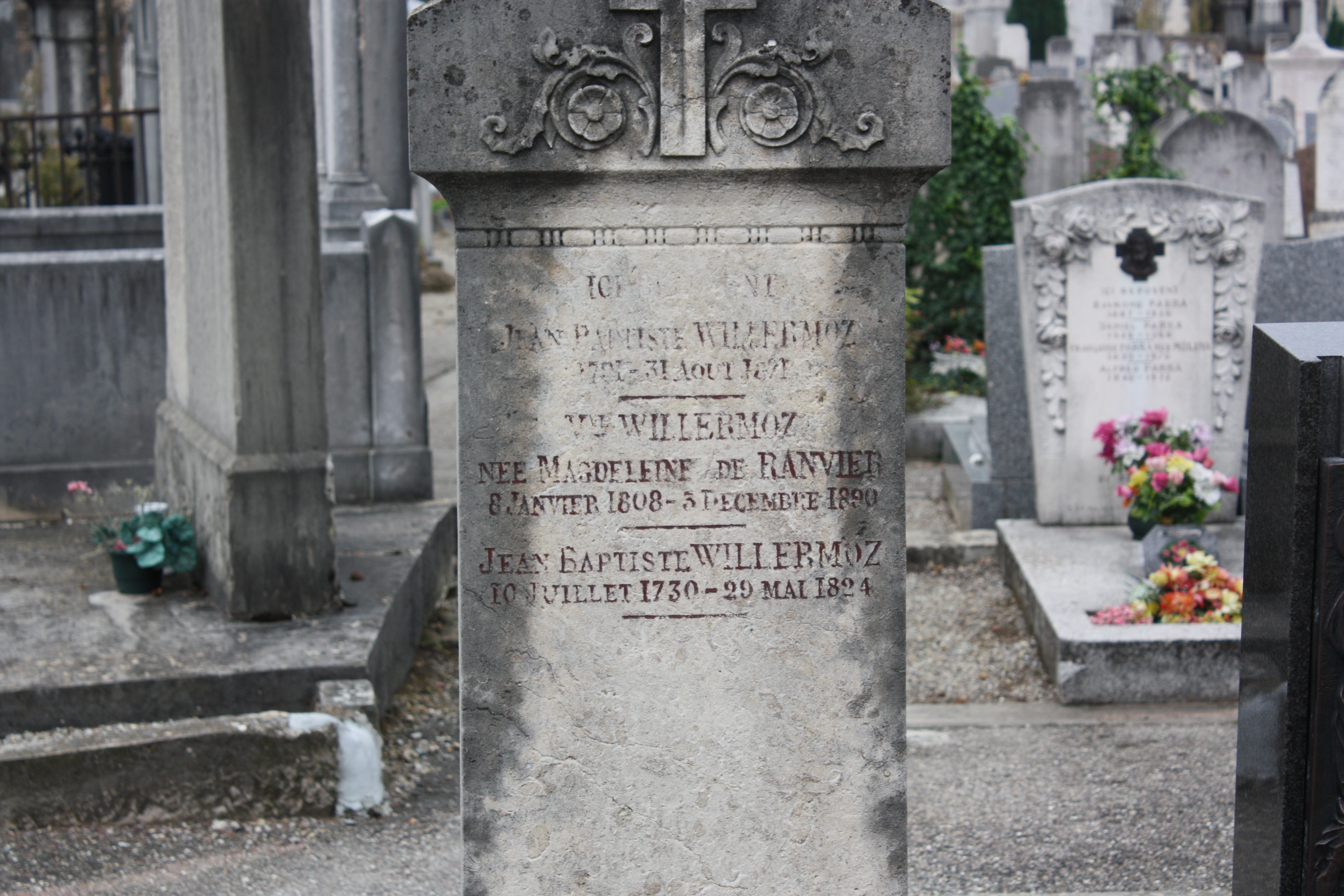 Могила Жана-Батиста Виллермоза в Лионе